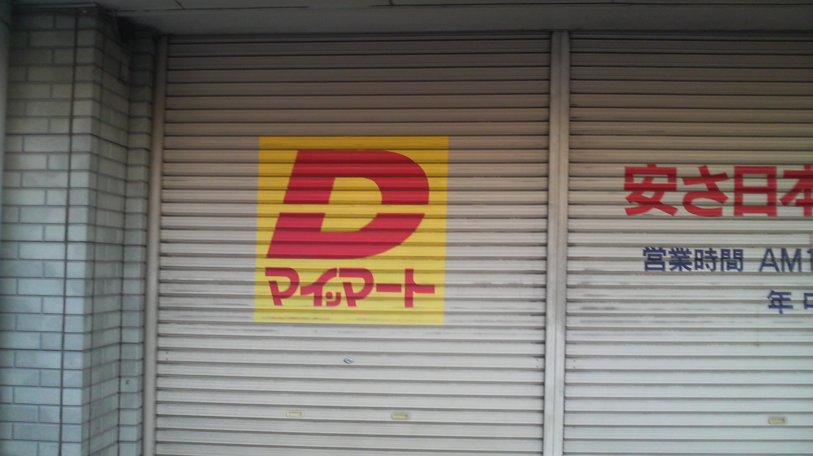 用賀店(閉店)のシャッターより。旧ロゴは「ン」の文字が小さい。